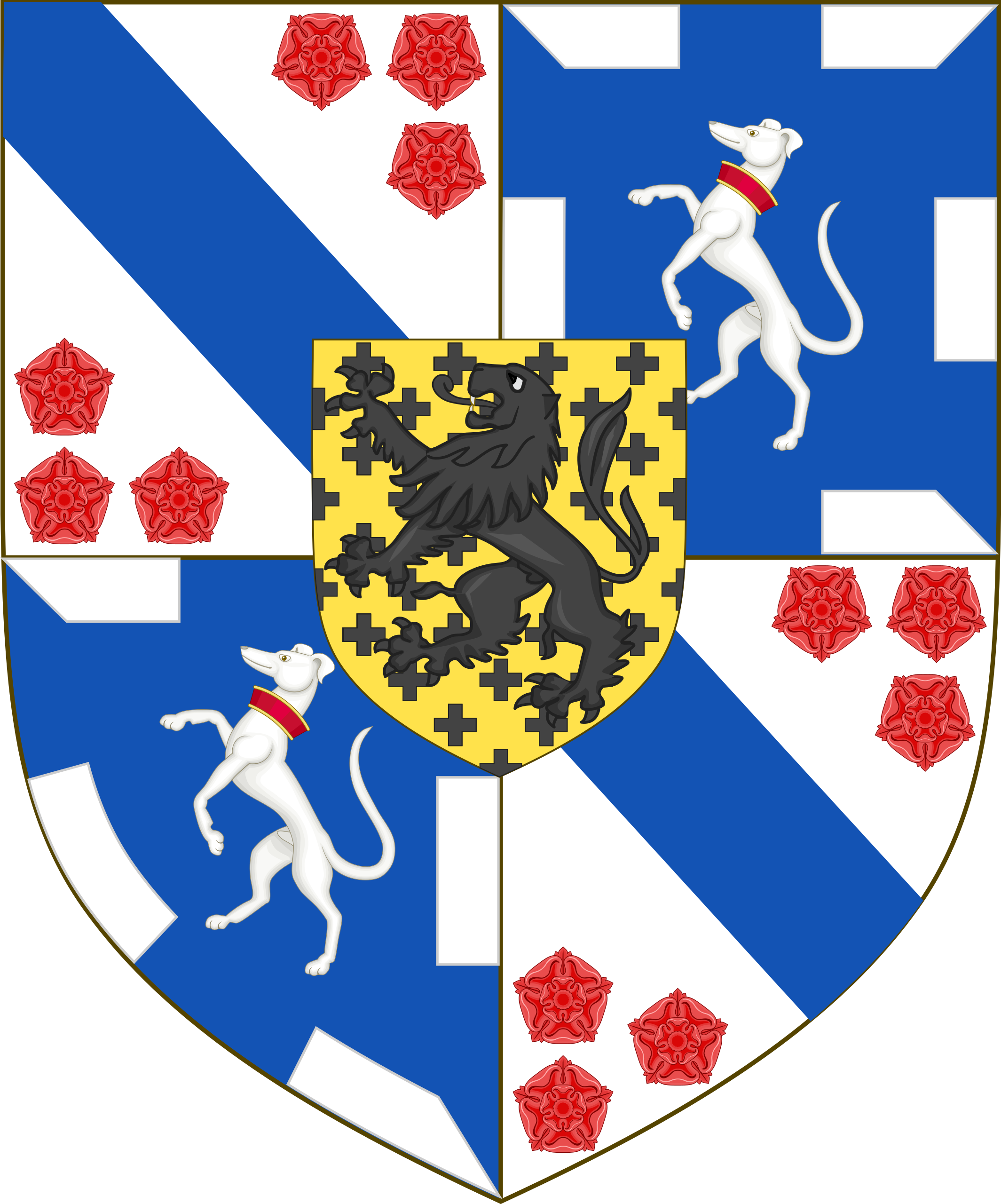 Armoiries de la famille Montboissier-Beaufort-Canillac